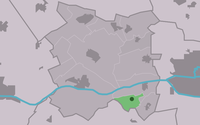 Kaartsje fan himrik fan Blessum